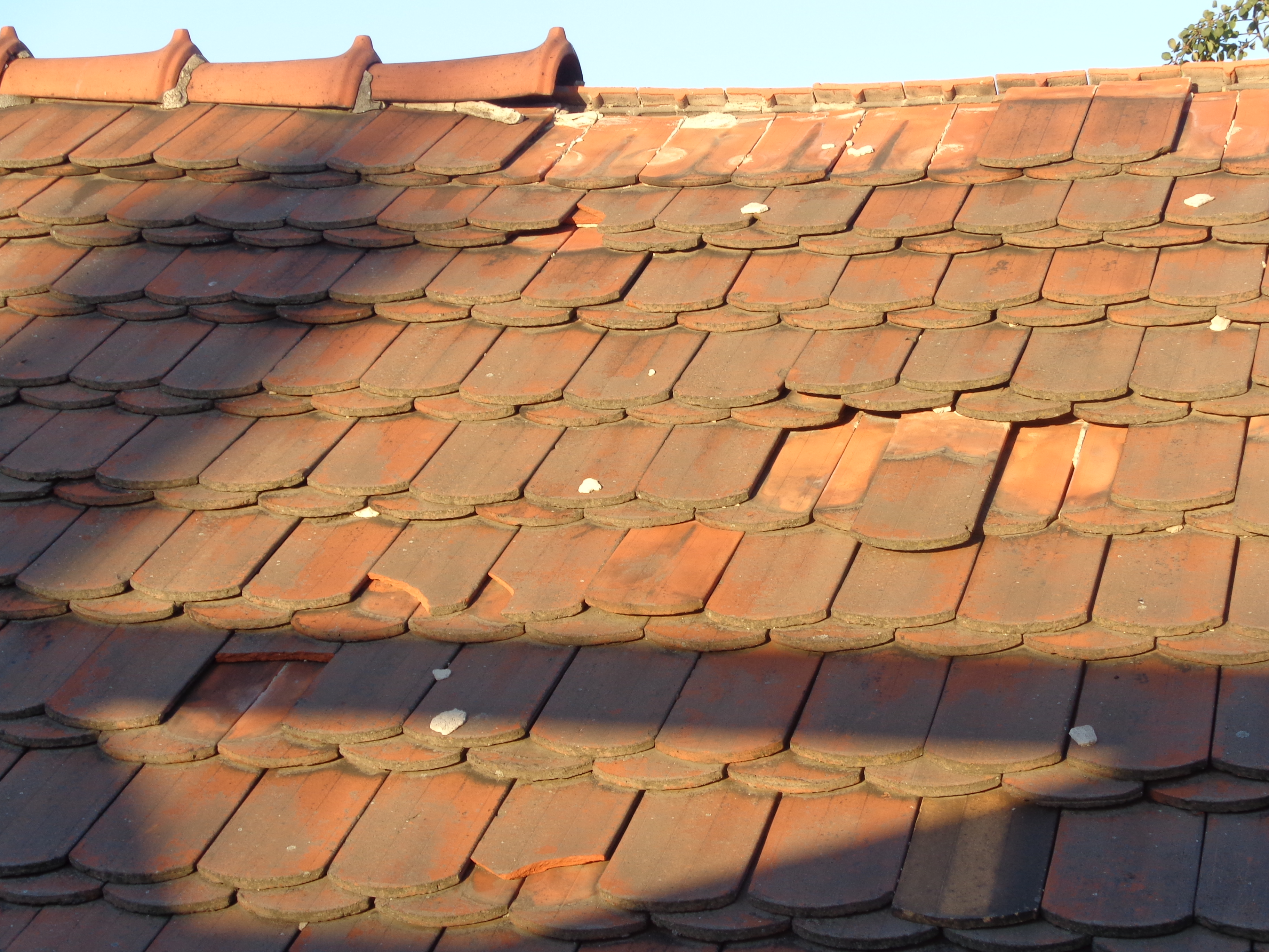 Defektes Biberschwanzdach in Potsdam